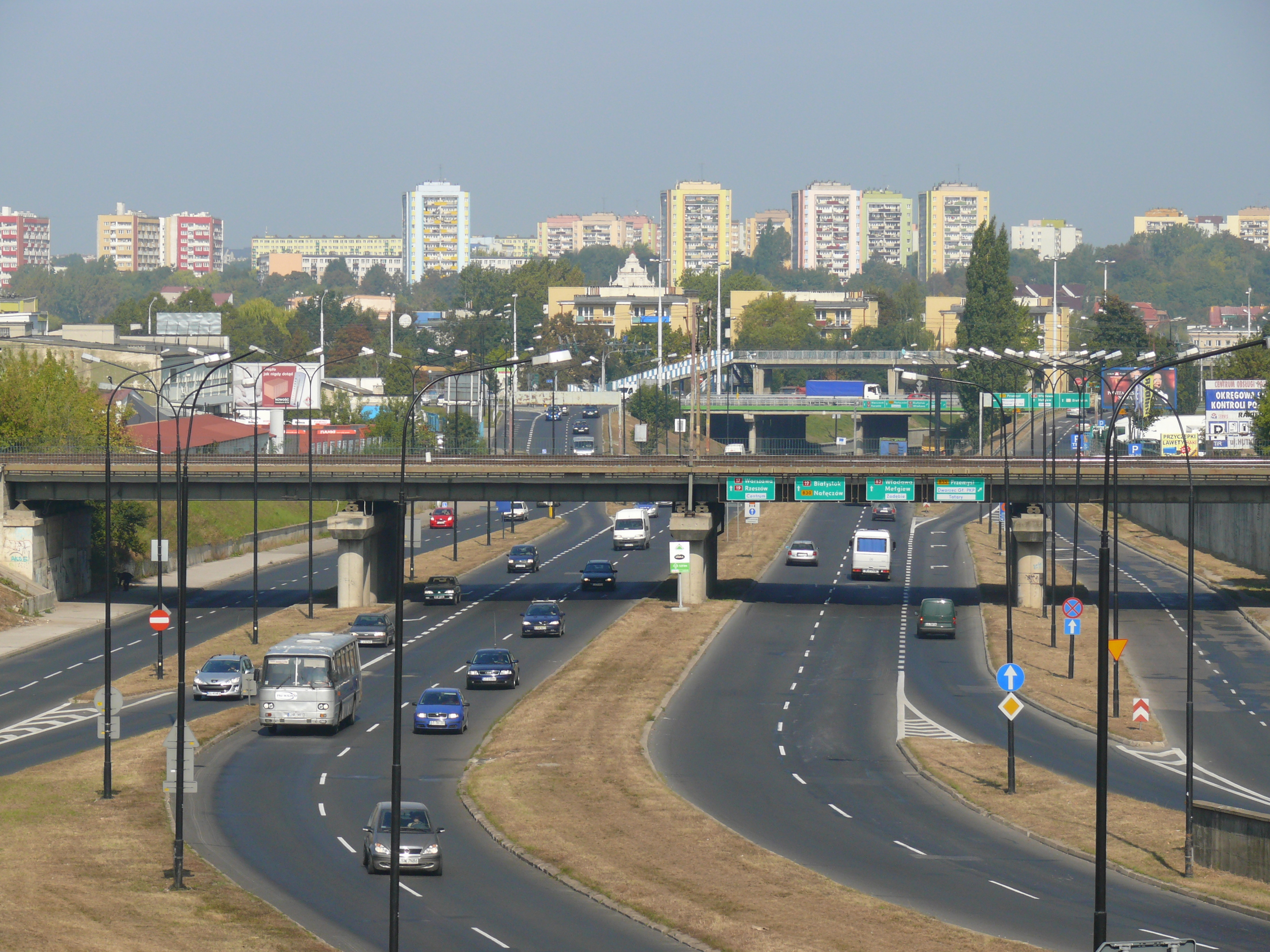 Aleja Wincentego Witosa w Lublinie - trasa tranzytowa na wschód